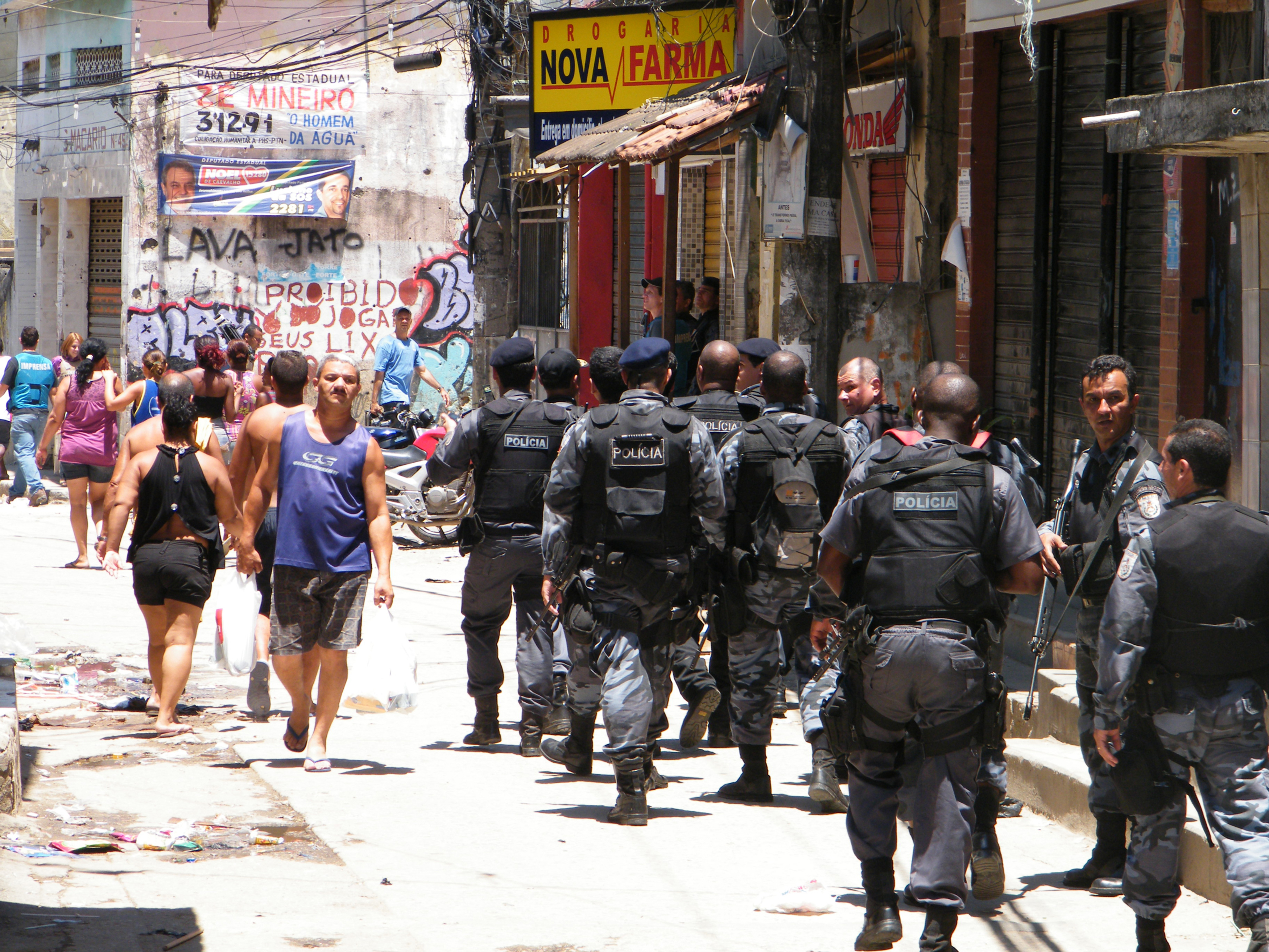 Rio de Janeiro - Forças de segurança ocupam o Complexo do Alemão depois de ter sido oferecida a possibilidade de rendição aos traficantes. A ação das policiais, com o apoio das Forças Armadas, inclui o uso de tanques militares, helicópteros e outros veículos. A bandeira do Brasil foi hasteada na parte mais alta do morro como marca da ocupação policial. Armas, munição e droga foram apreendidas em vários locais.